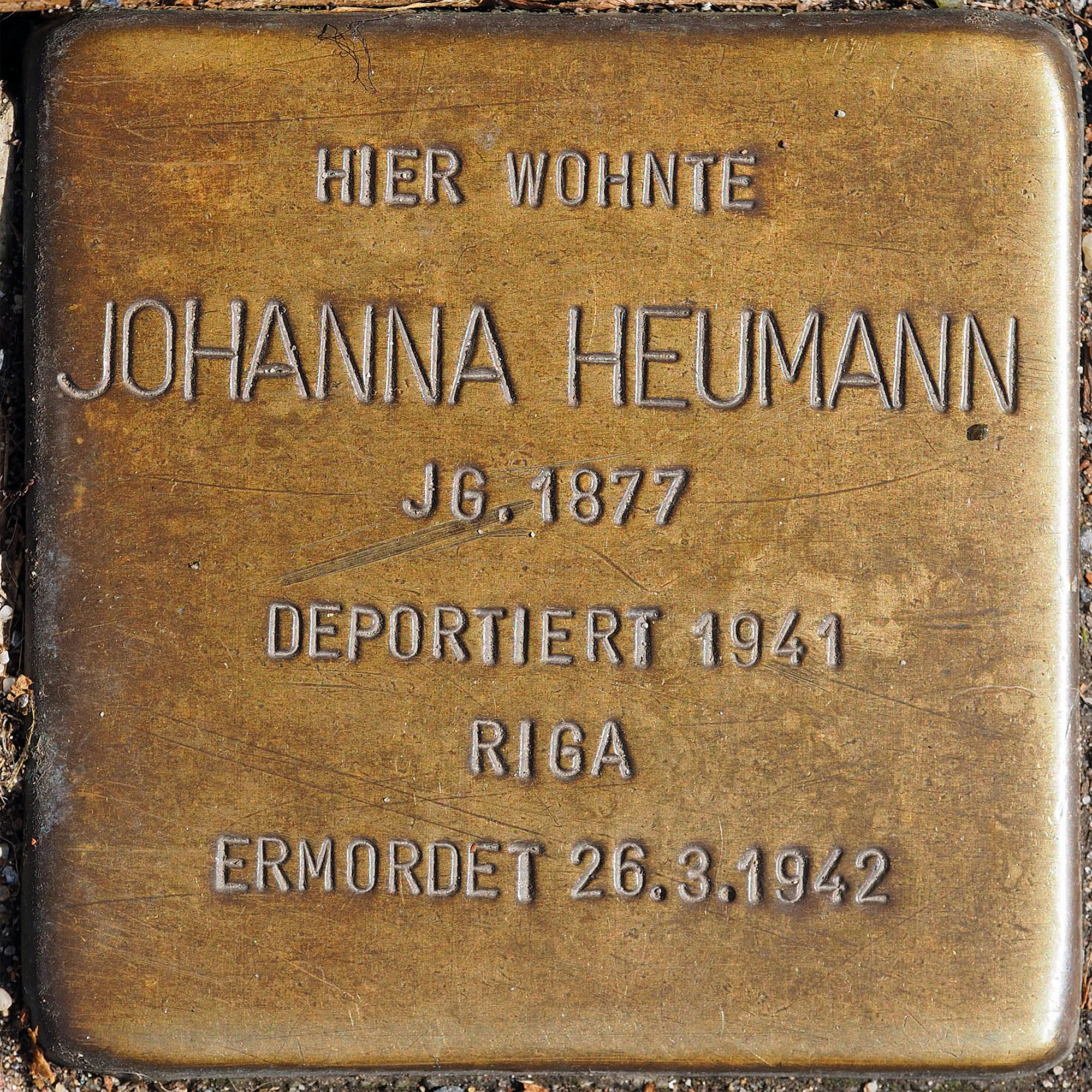 Stolpersteine MG: Heumann, Johanna